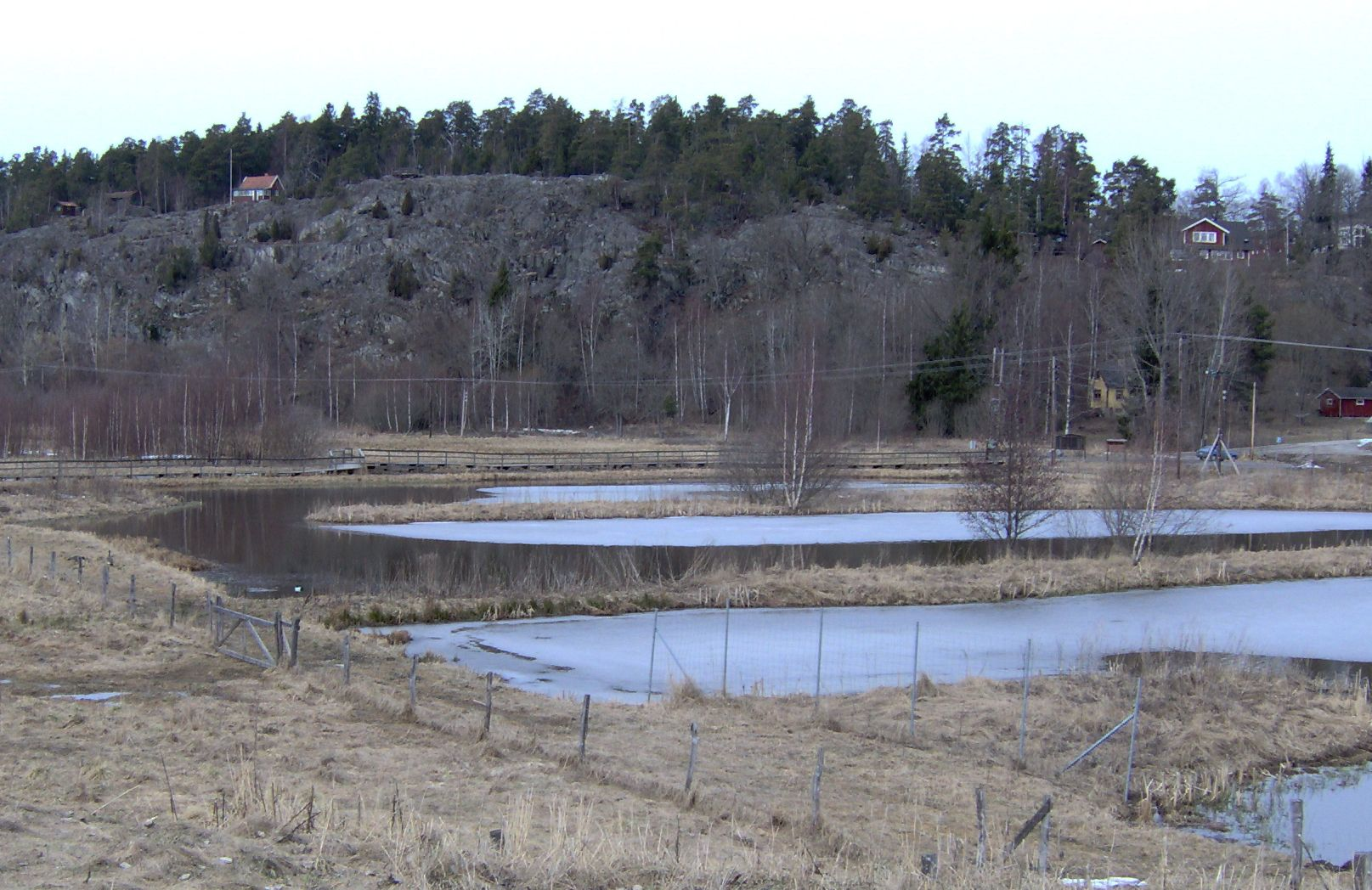 Våtmarksreningsanläggningen i Flemingsbergsviken, Huddinge kommun. Vattnet meandrar fram. Ibakgrunden syns branten efter sprickdalen. Flemingsbergsviken är en del av sjön Orlången.